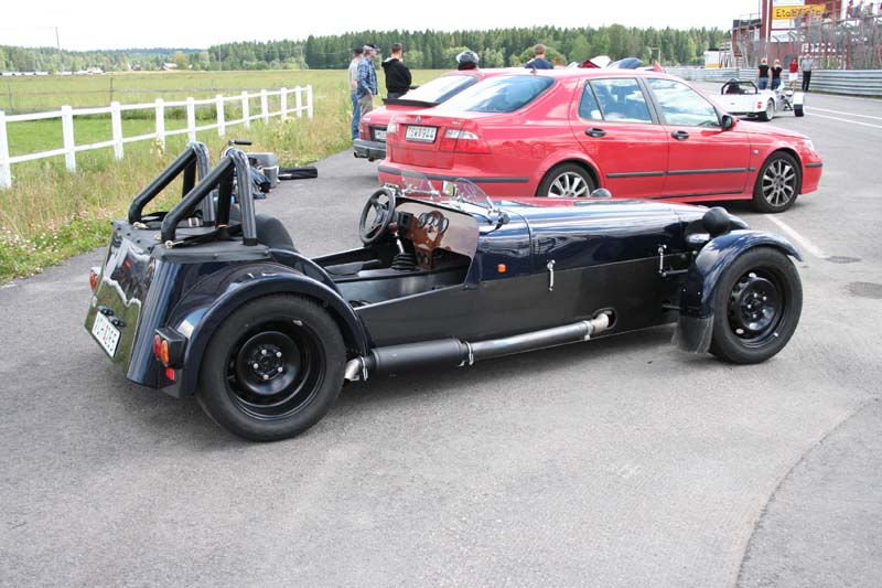 Dala 7